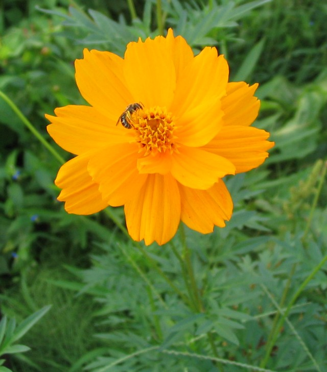 Cosmos sulphureus